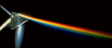 Lichtdispersion mittels Prisma